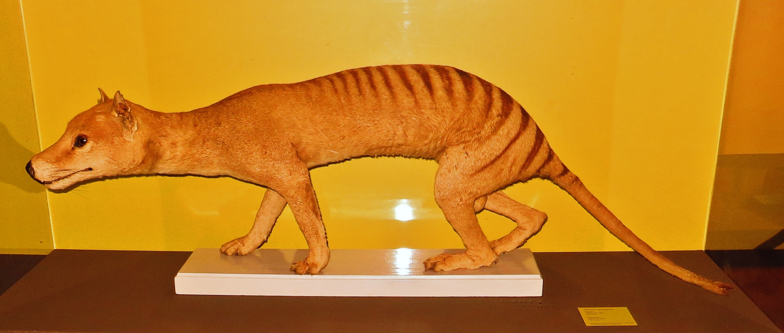 Thylacine - Took the picture at MUSE, Trento